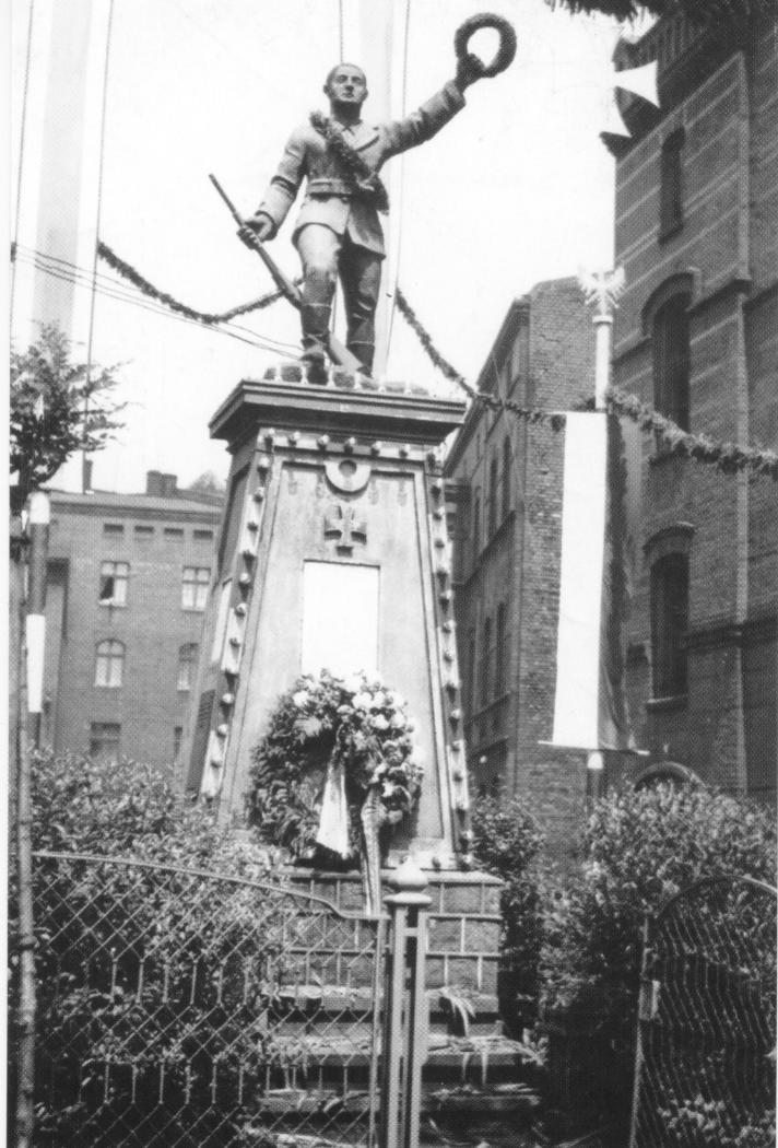 Pomnik Powstańca Śląskiego w Chropaczowie